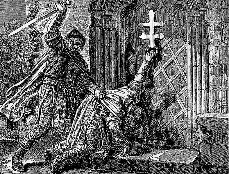 Краљу Владимиру секу главу (1016). (Јован Владимир, око 970 - 1016). литографија.